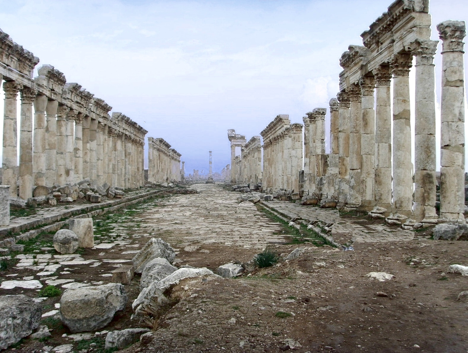 Apamea